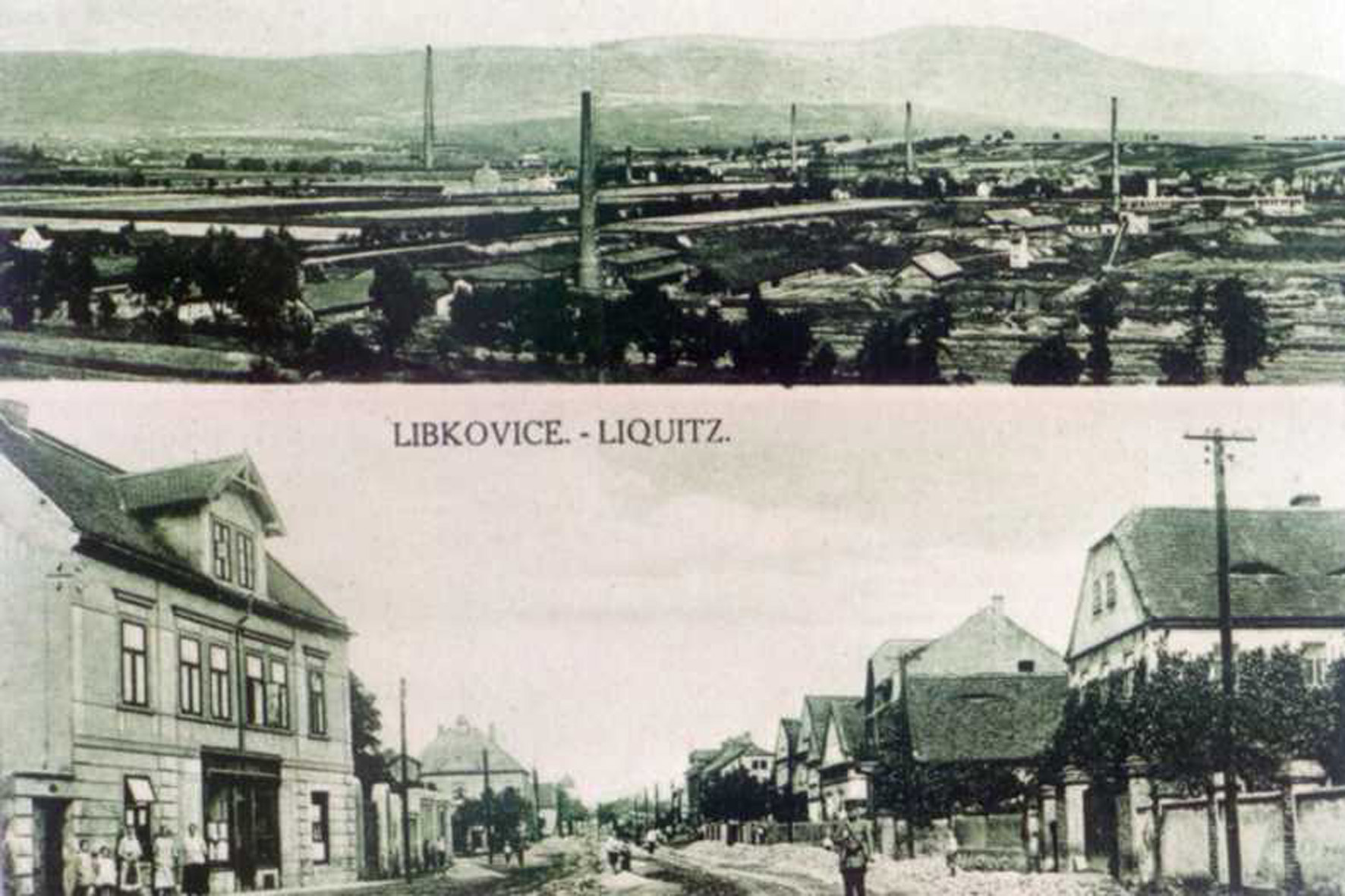 Dorf Libkovice (Liquitz) bei Most (Brüx)